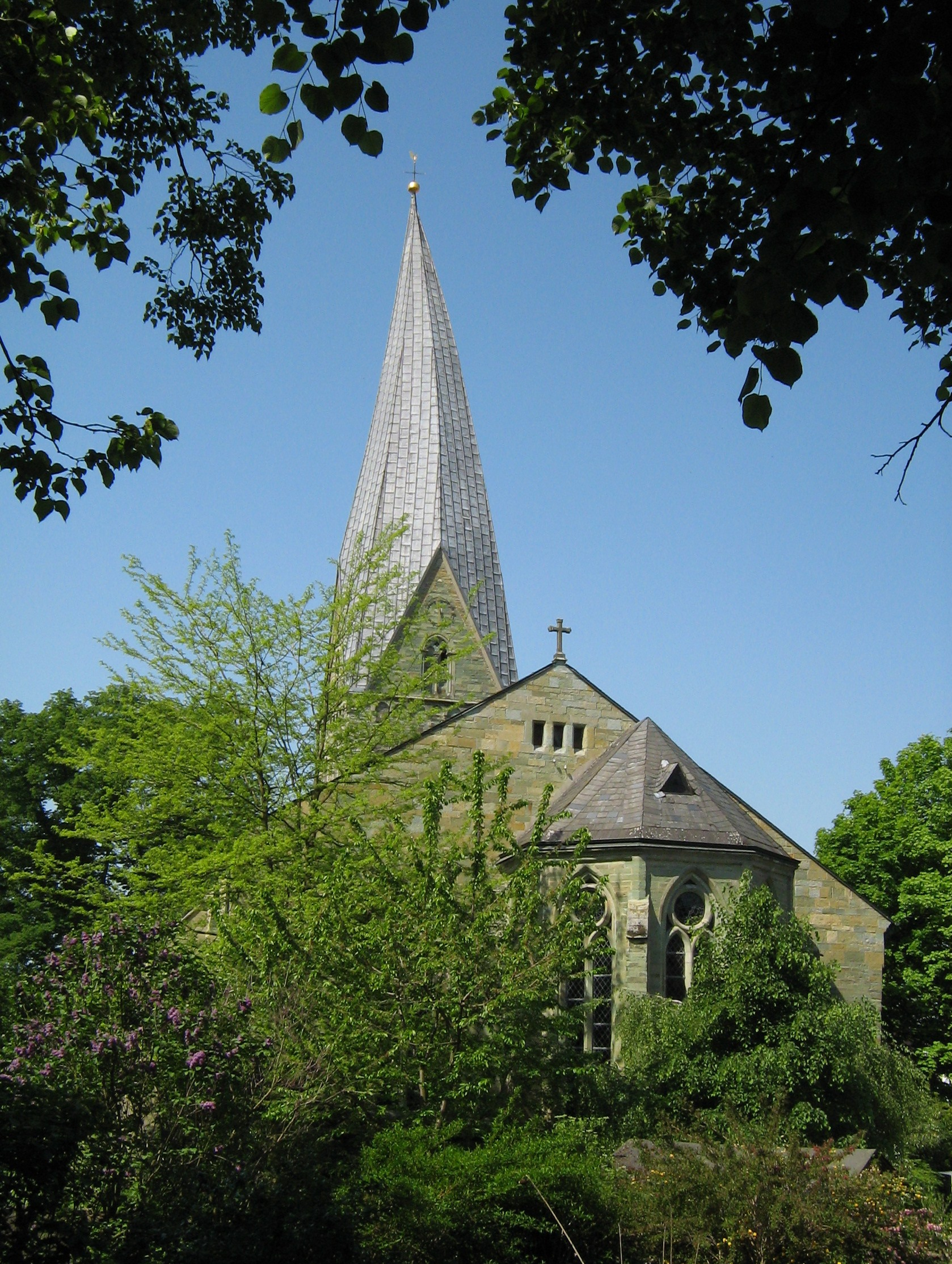 Foto von Alt-St.Thomä in Soest vom Wall aus